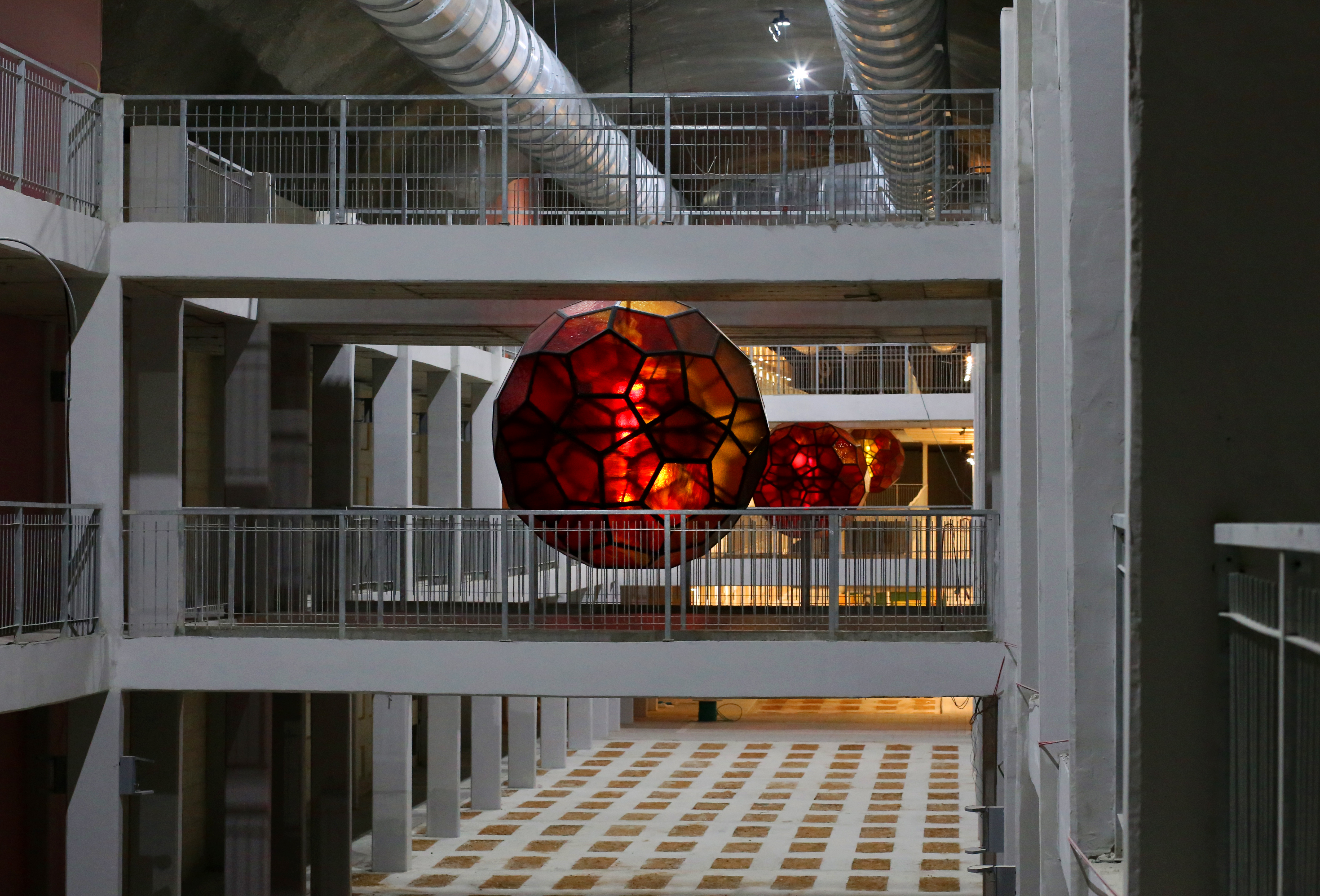 Lichtsphären des internationalen Künstlers Gabriel in dem unterirdischen Friedhof HarHamenuchot in Jerusalem